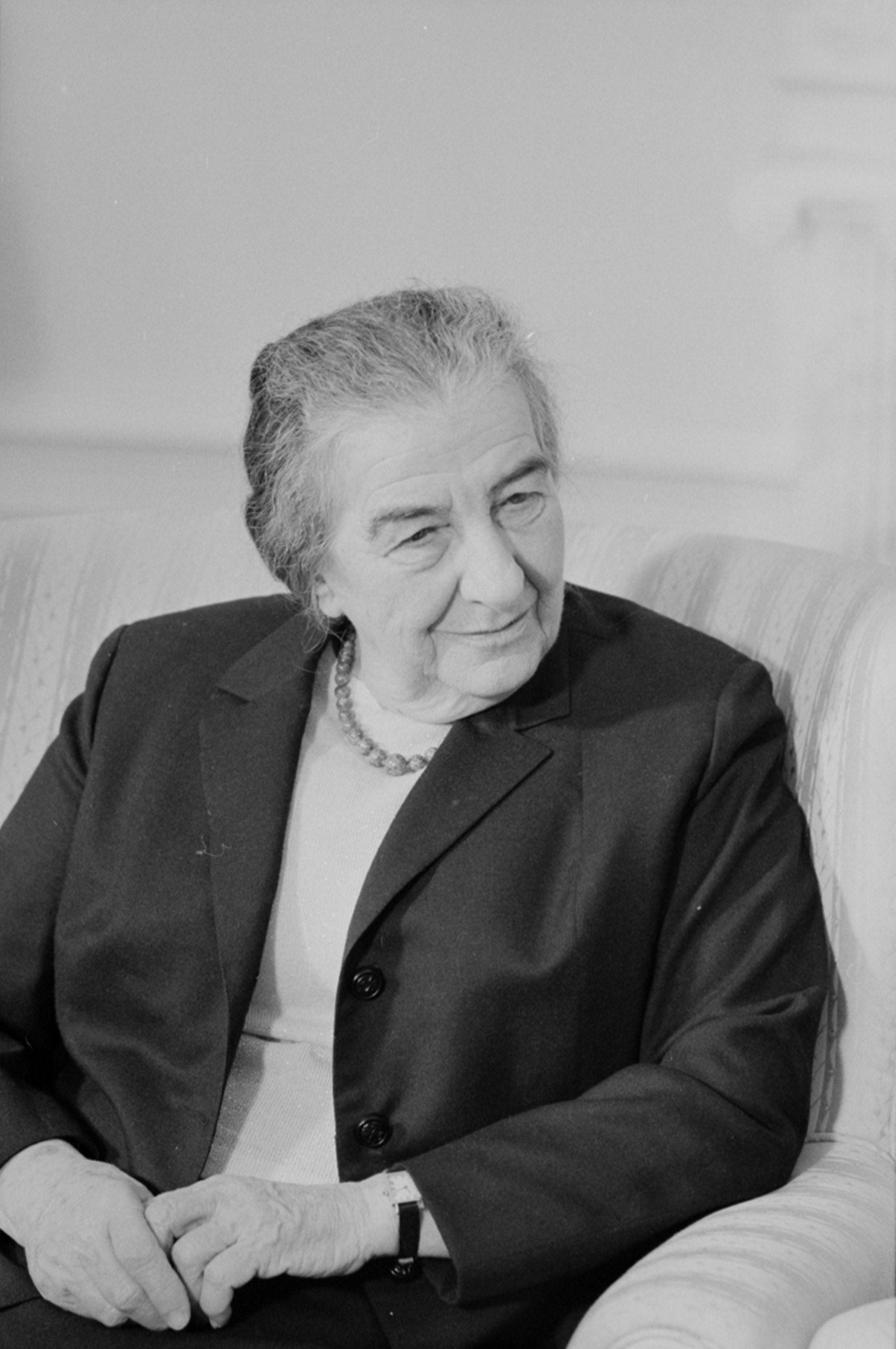 Golda Meir